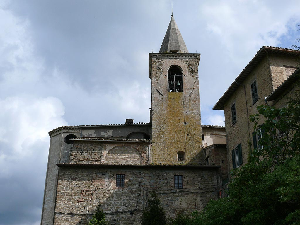 Veduta laterale del campanile e dell'abside della chiesa di San Crispolto